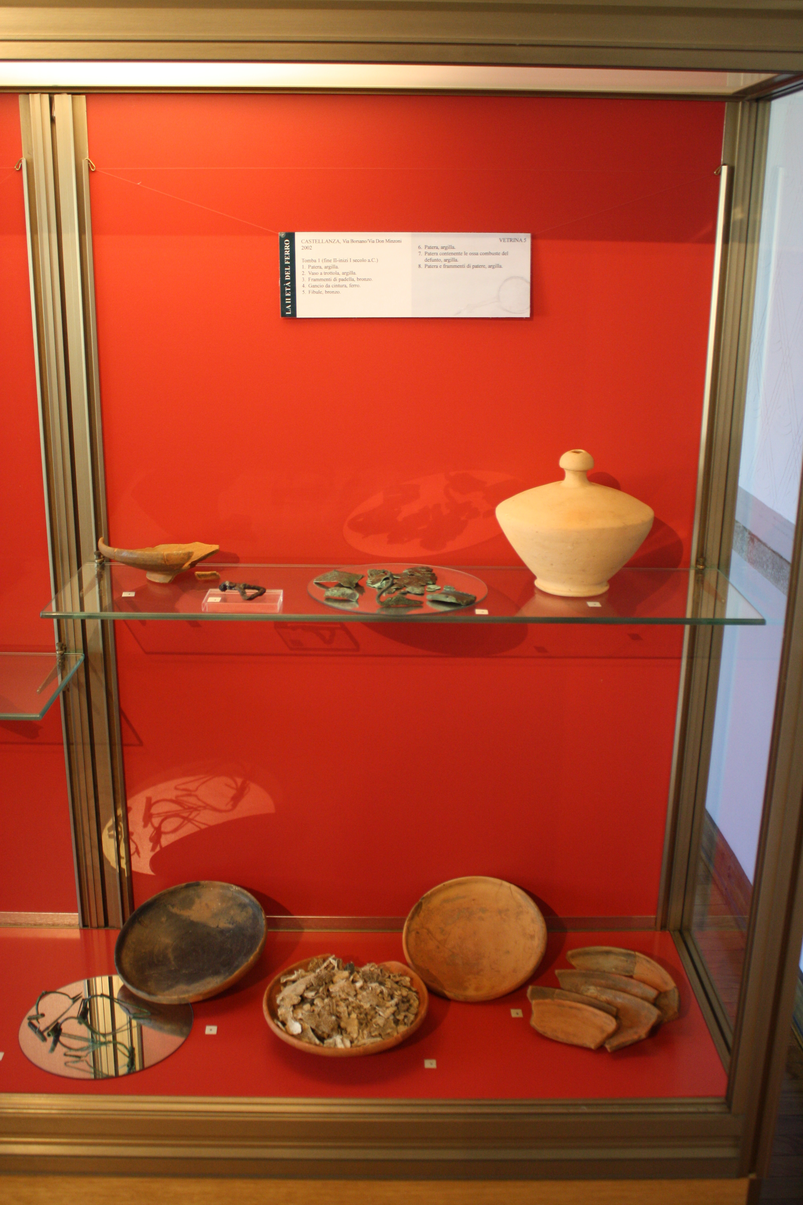 Ritrovamenti d'età romana (fine II-inizi I sec. a.C.) rinvenuti a Castellanza nel 2002 in via Don Minzoni/via Borsano